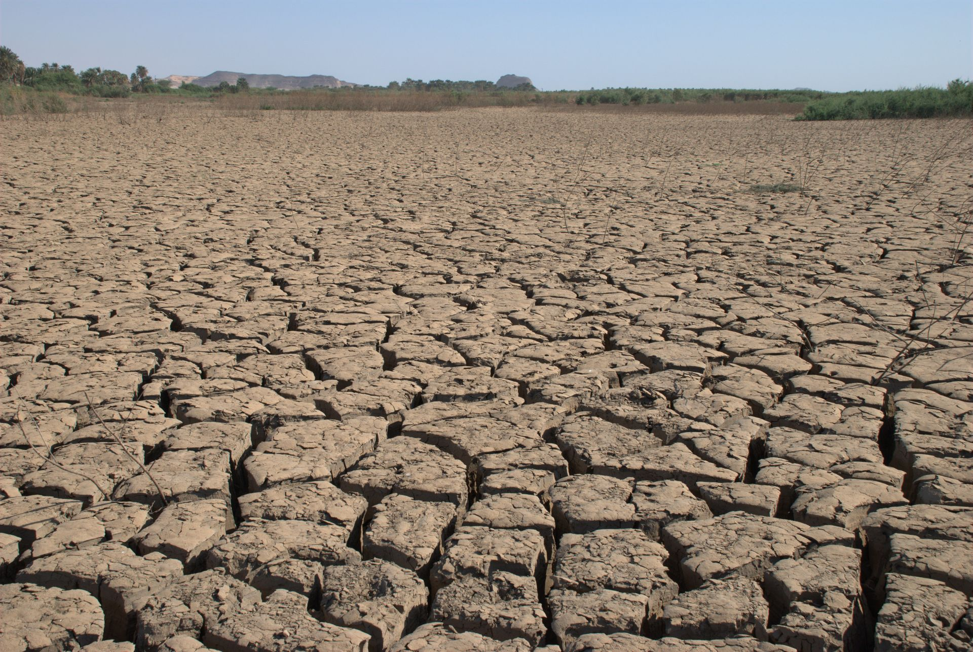 Bank of Nile in Nubian Desert, Karima, Sudan